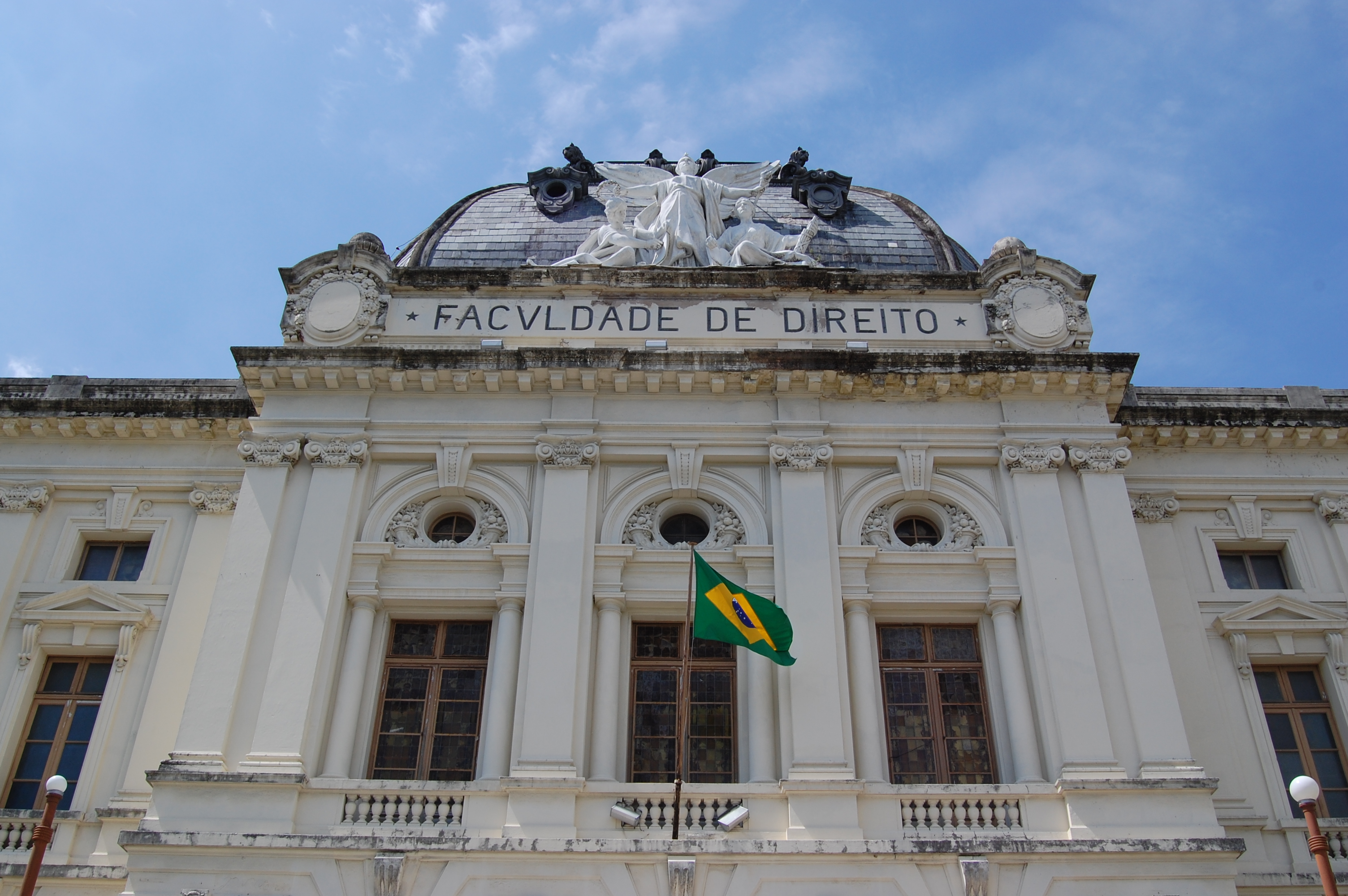 O edifício da Faculdade de Direito da Universidade Federal de Pernambuco.